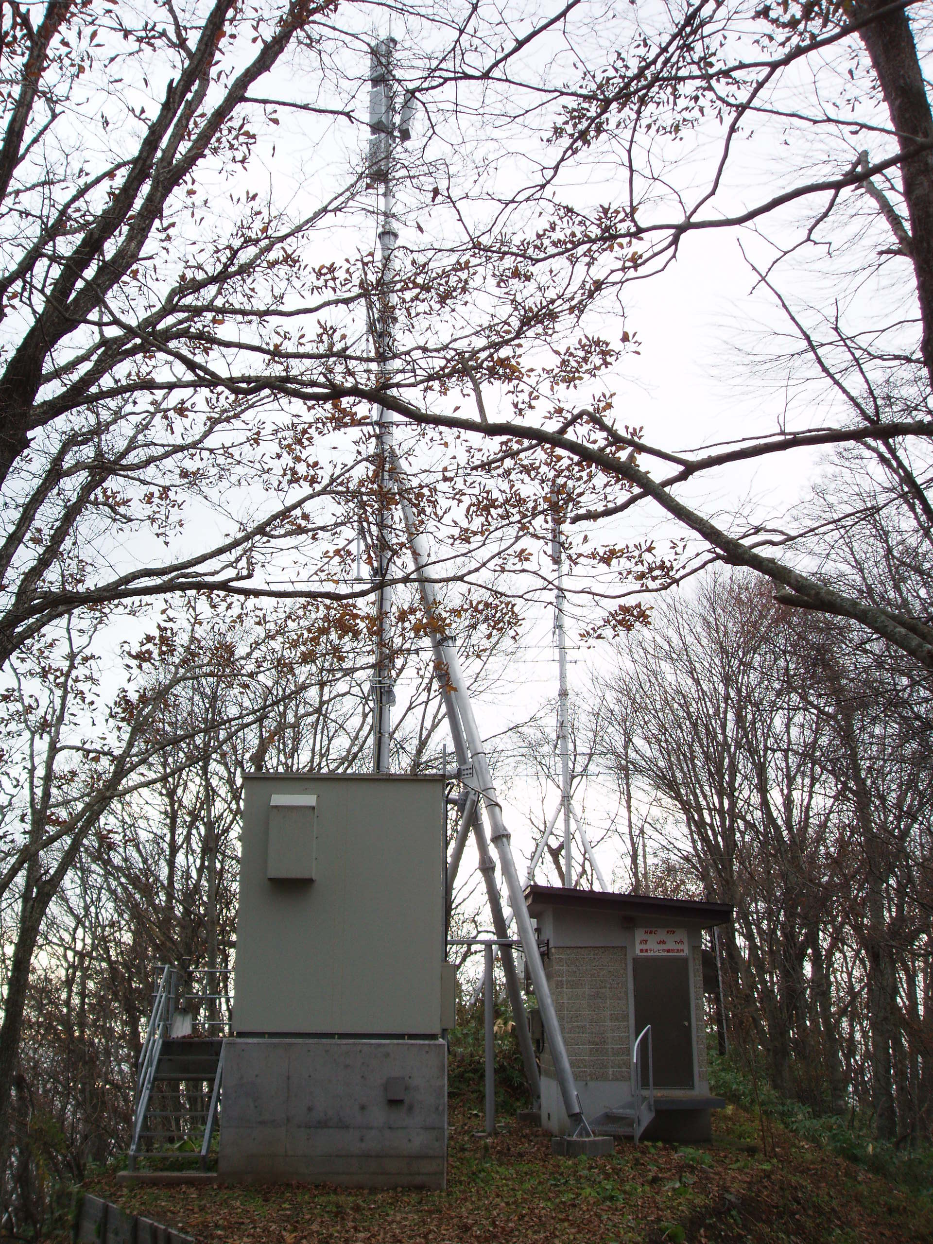 豊浦中継局（全局デジタル・民放アナログ）